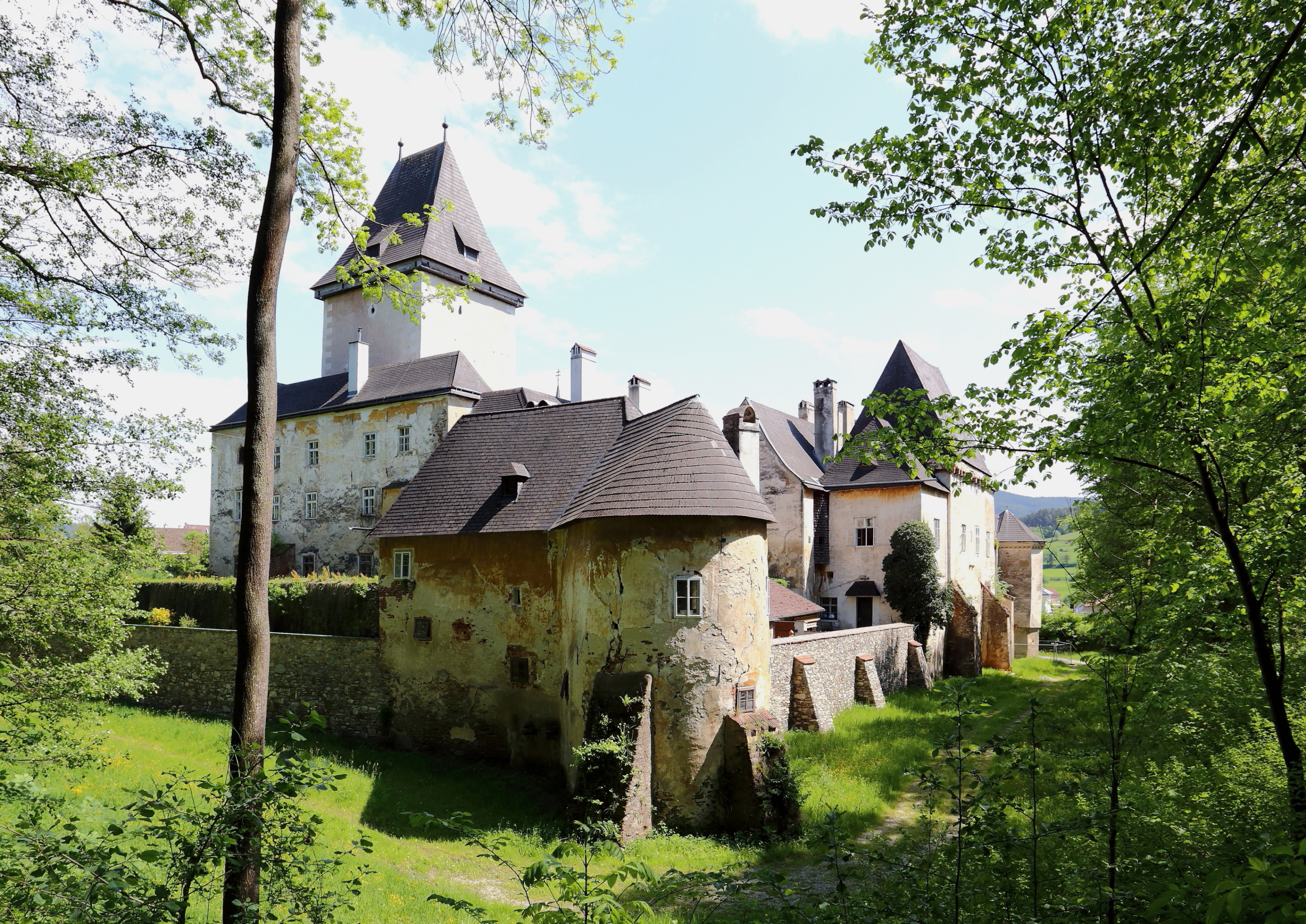 Nordwestansicht des Schlosses Roggendorf in der niederösterreichischen Marktgemeinde Pöggstall. Die Kernbausubstanz dieser ehemaligen Wasserburg stammt aus dem 13. Jahrhundert.